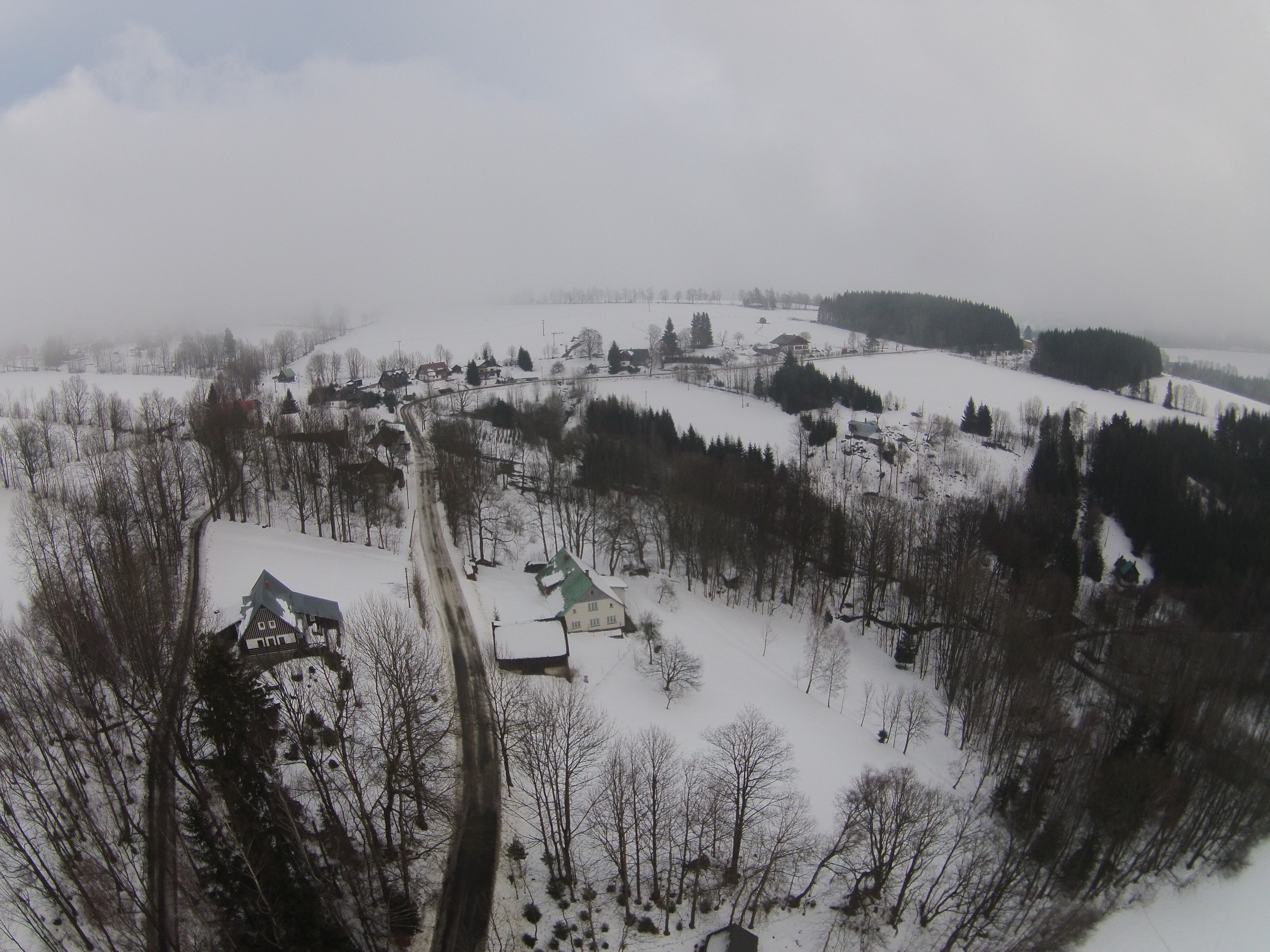 Celkový pohled z ptačí perspektivy. Jestřabí v Krkonoších.